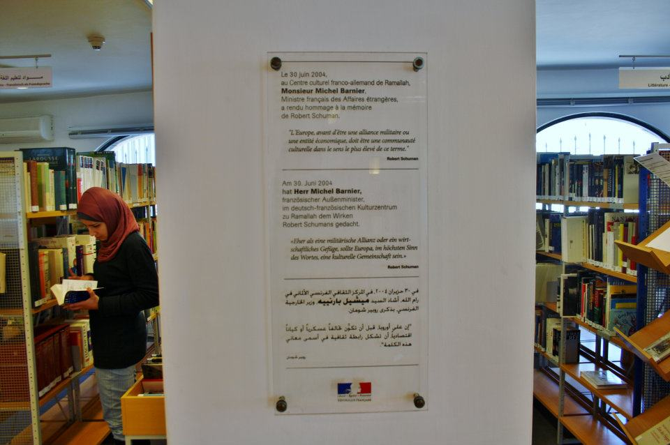 La médiathèque « Robert Schuman » du centre culturel franco-allemand de Ramallah réunit un fonds sur la France et sur l’Allemagne, avec une priorité donnée aux livres et aux documents audiovisuels aidant à l’apprentissage de la langue française et allemande et à la littérature d'après 1950.